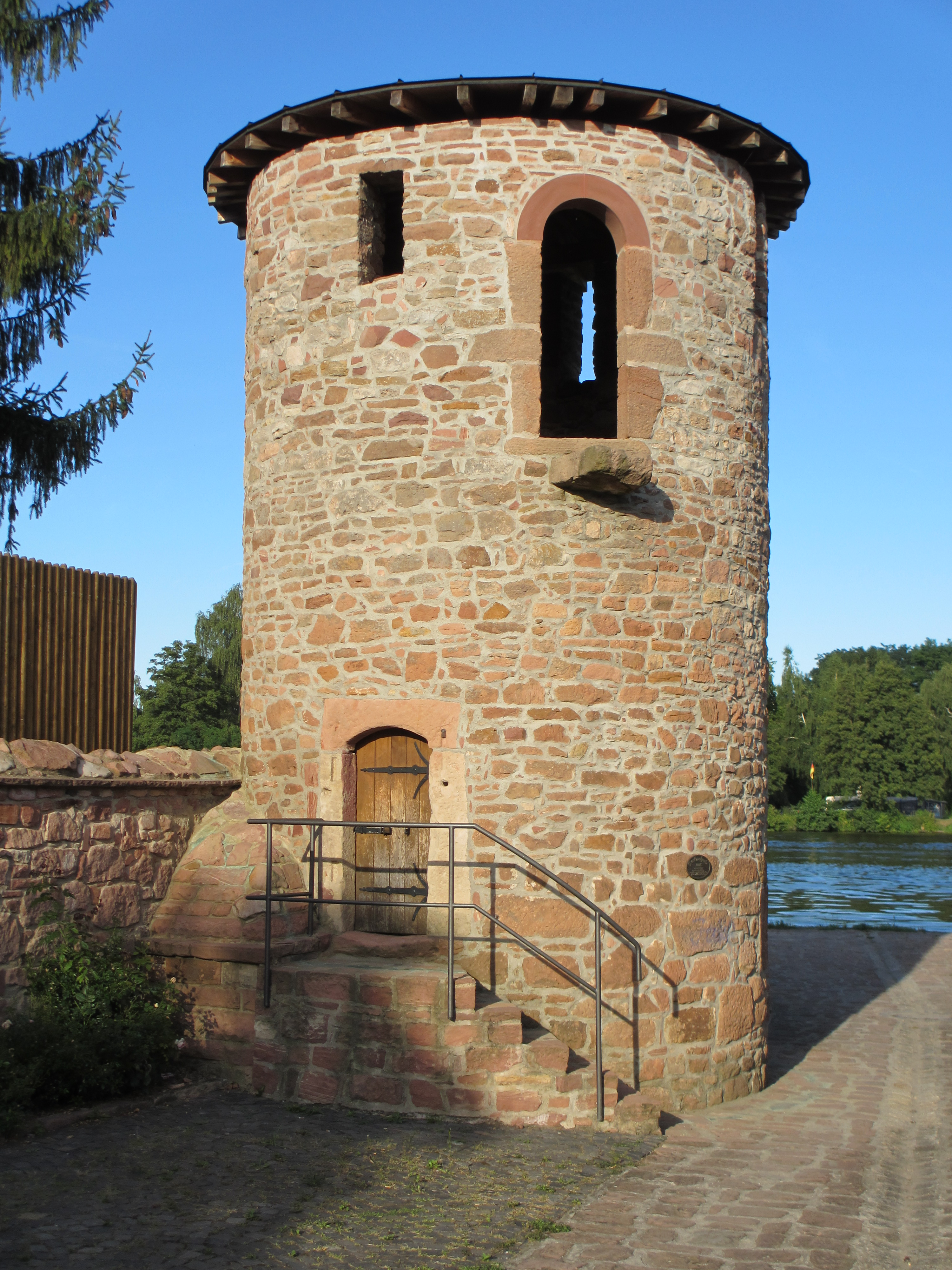 Der im Jahre 2006 restaurierte Turm am Main in Niedernberg, Bayern, DeutschlandAktennummer des Baudenkmals: D-6-76-144-13